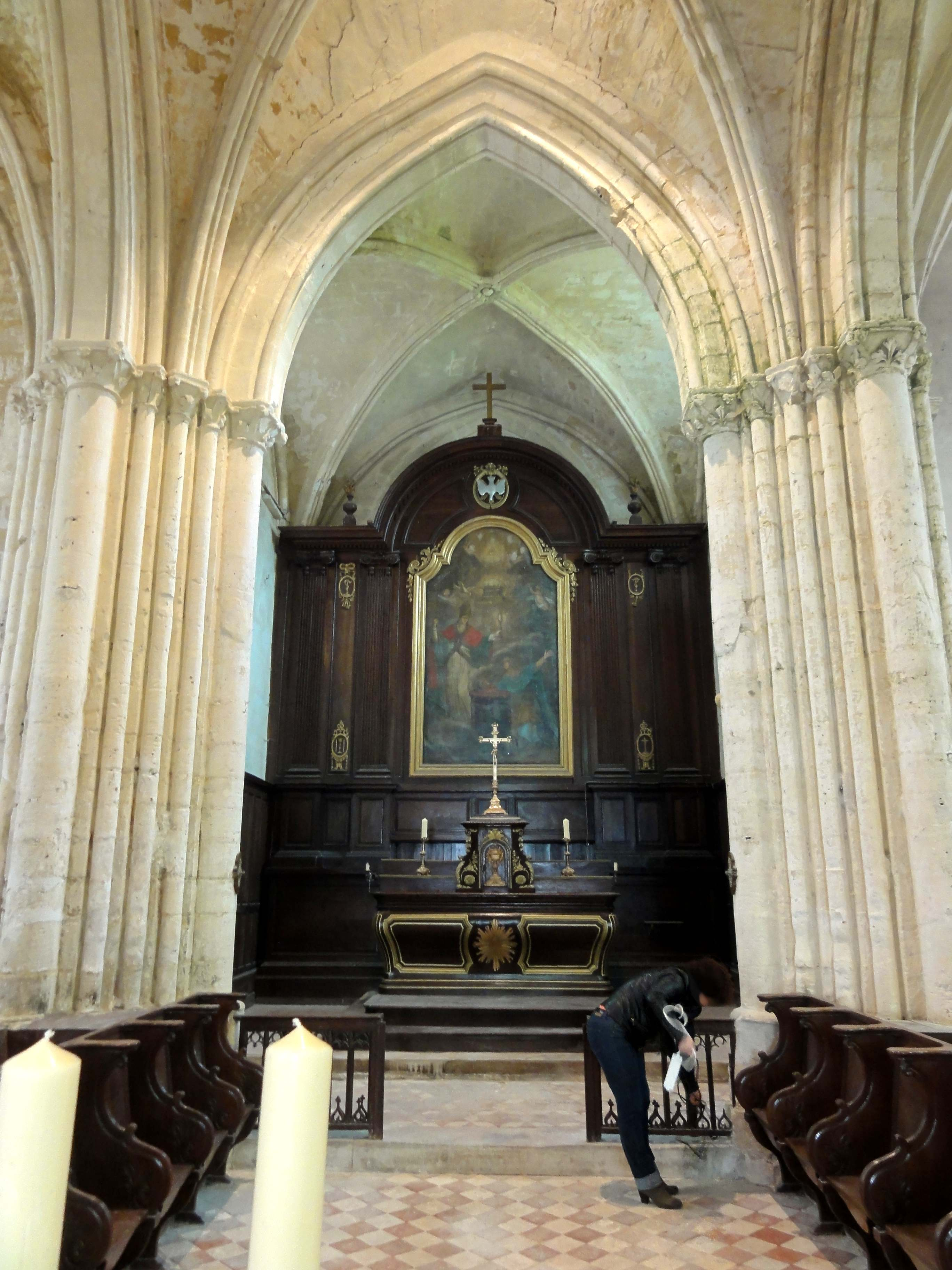 Intérieur de l'église (voir titre).